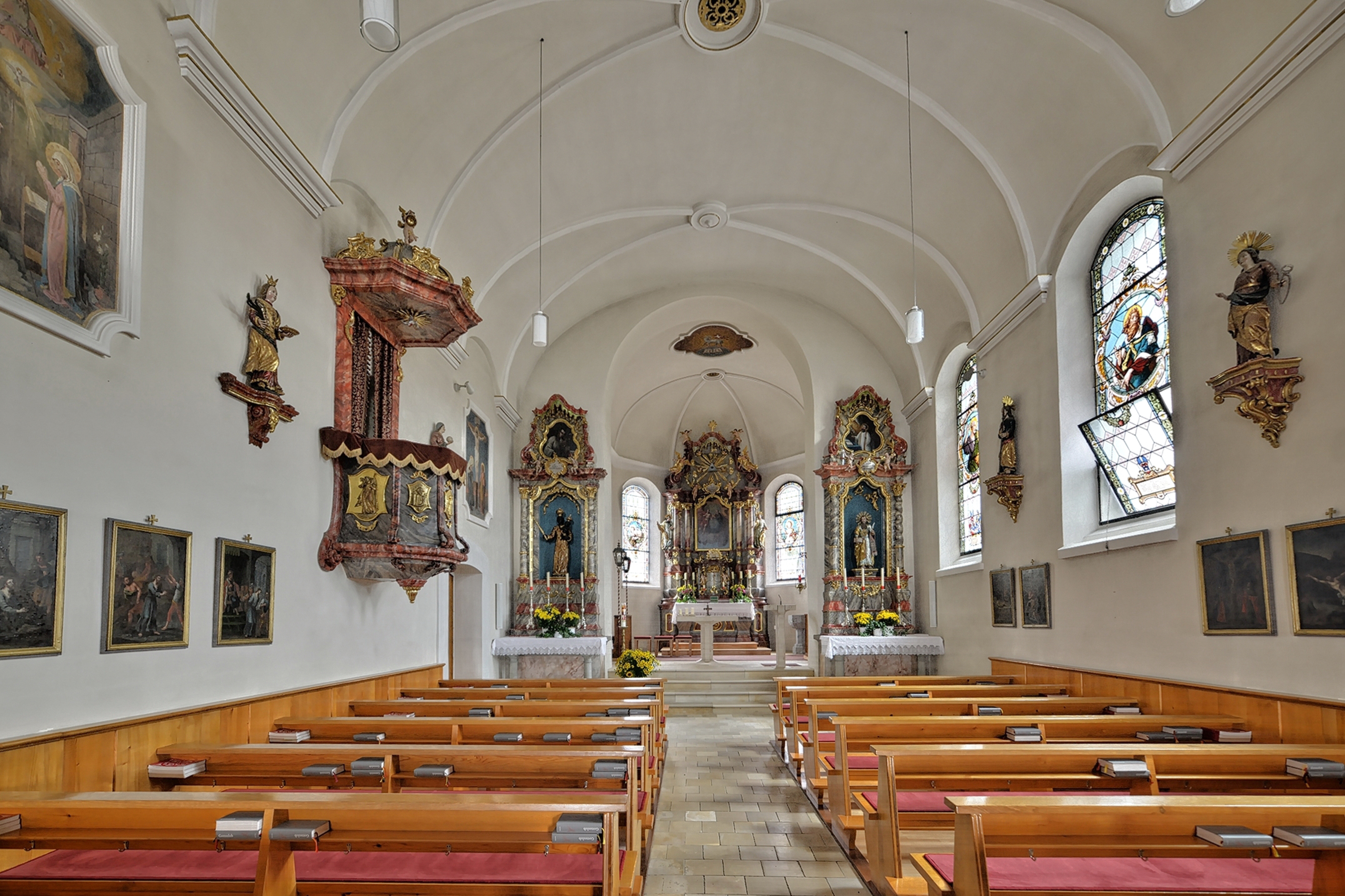 Pfarrkirche "Hl. Batholomäus" in Übersaxen.